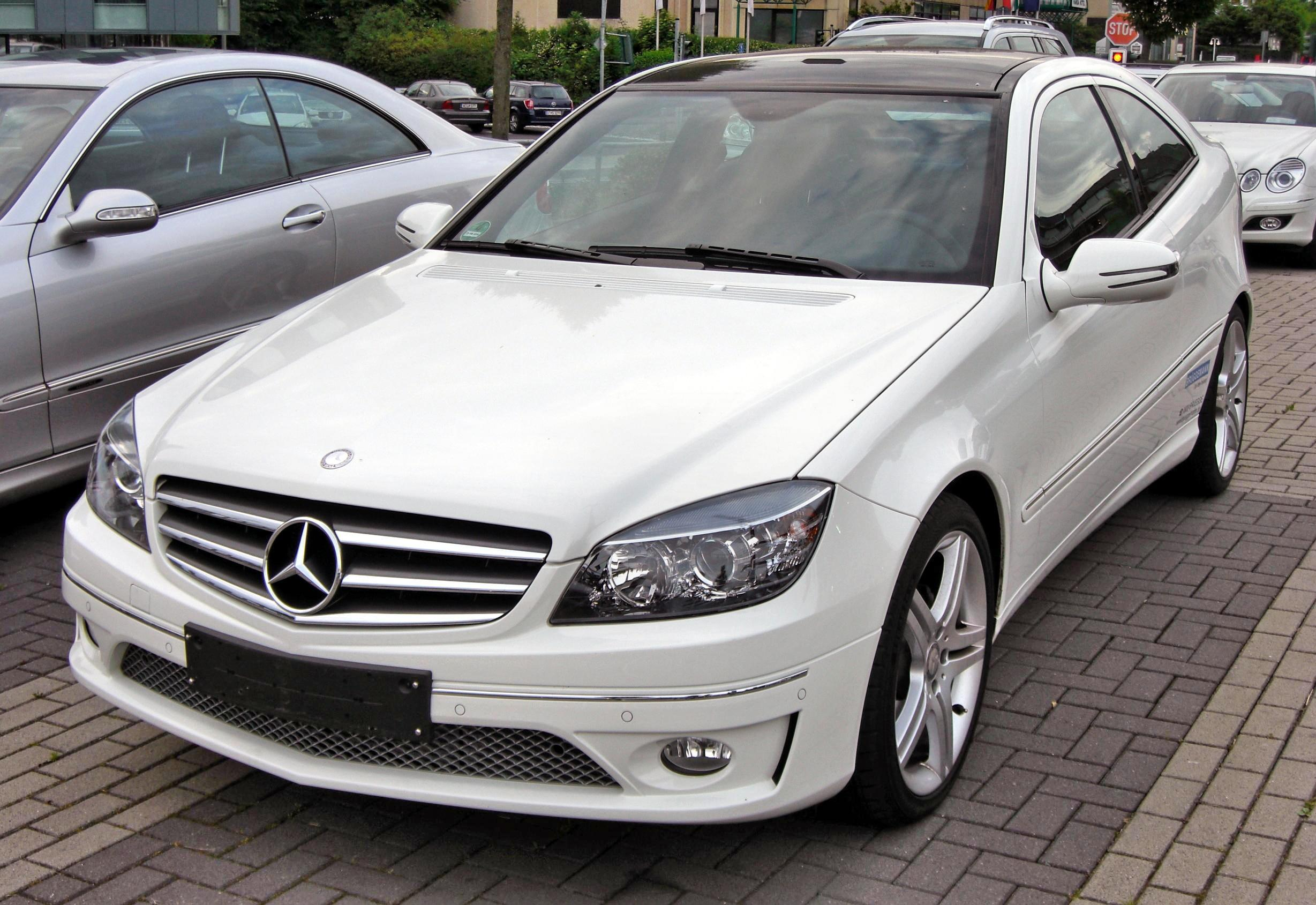 Mercedes CLC